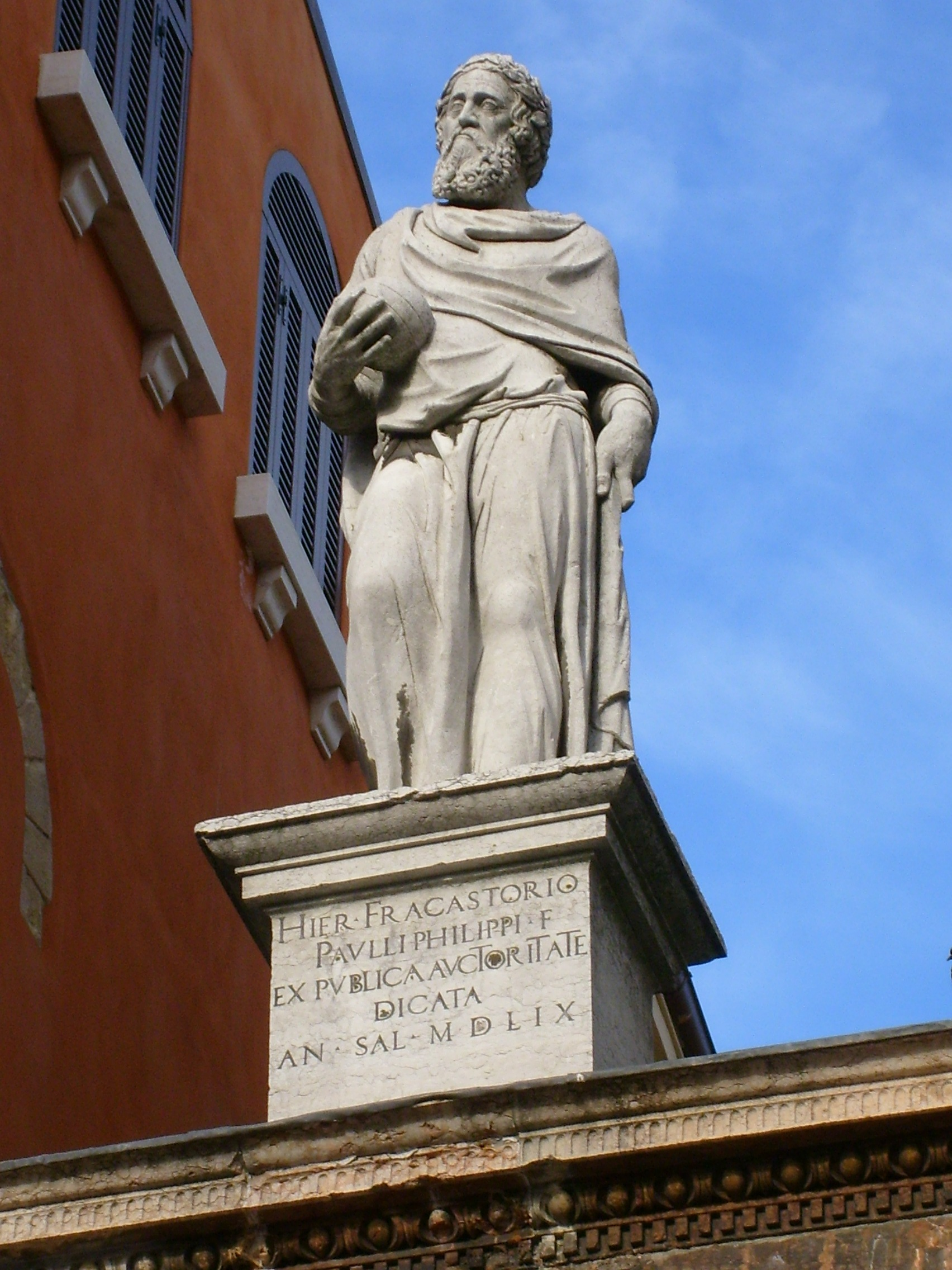 Monument to Girolamo Fracastoro (statue), Piazza dei Signori, Verona, Italy